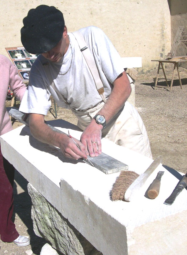 Tailleur de pierre en train de tracer son bloc de calcaire à l'aide d'une pointe et d'une règle. Photo de So Leblanc, libre de droit. Commons:Category:Stonemasons